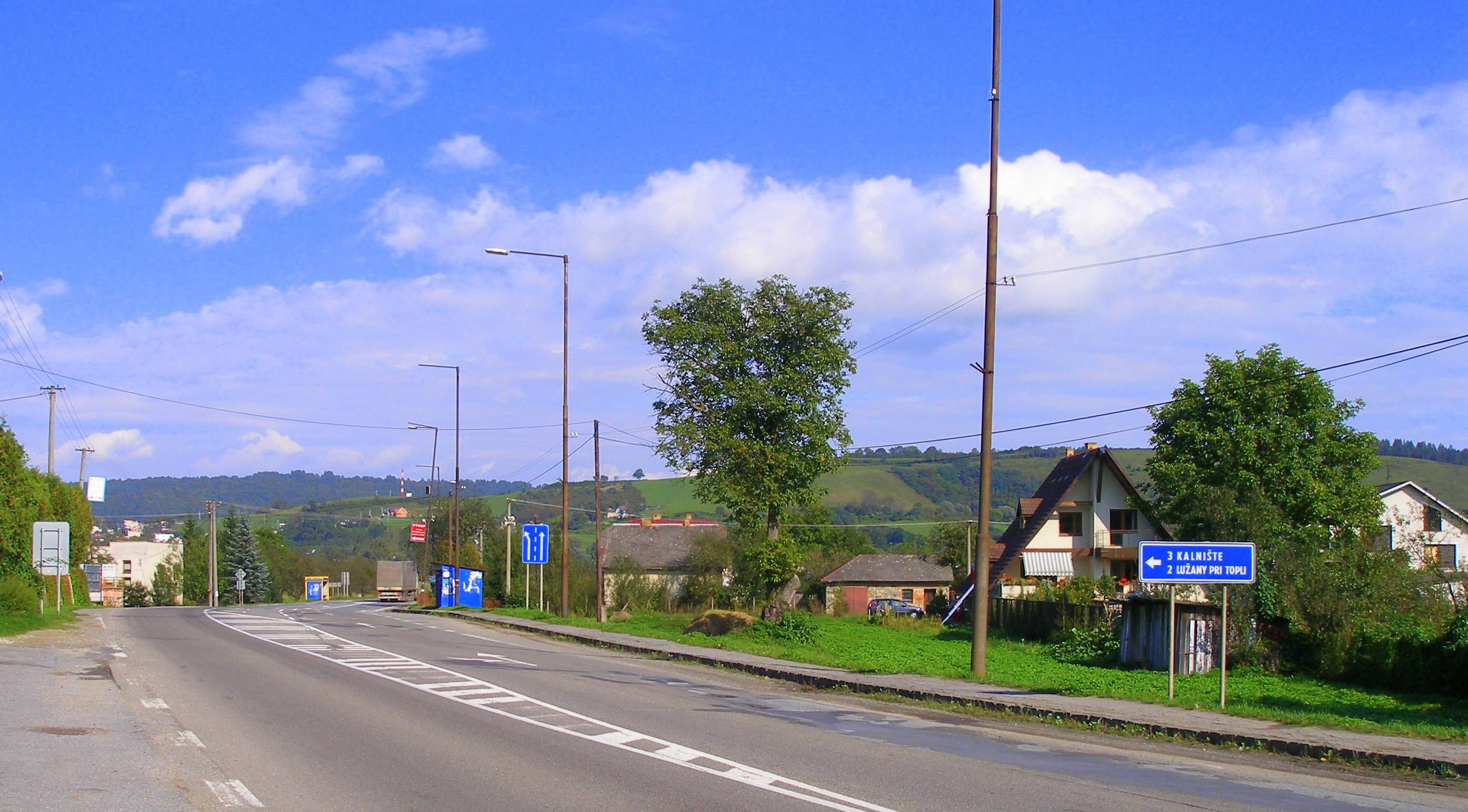 Obec Kračúnovce, okres Svidník.